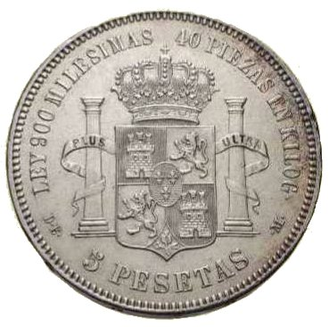 5 pesetas, Alfonso XII, 25 gr. plata 900, 1875-1876 Madrid DE M